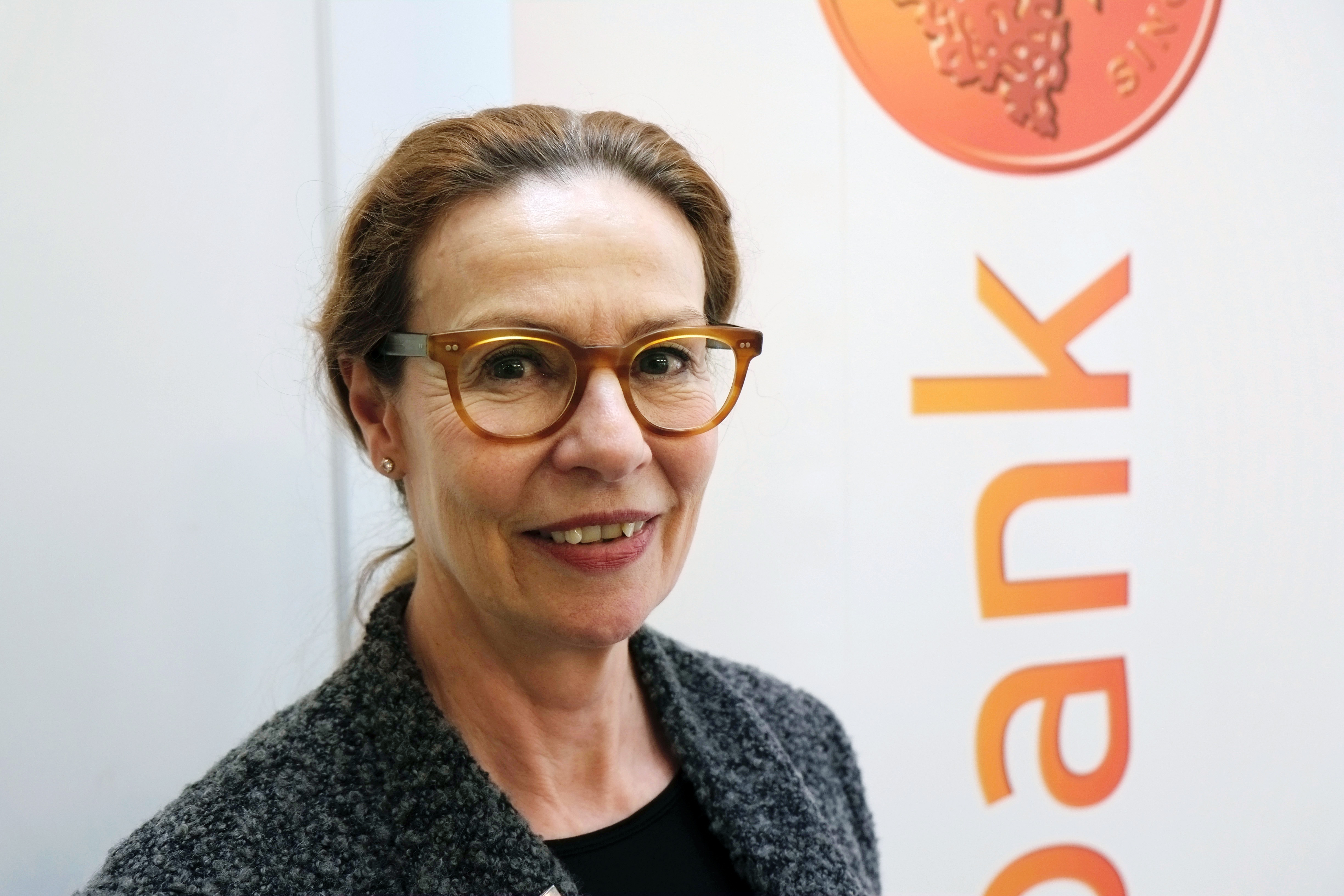 Birgitte Bonnesen, dansk koncernchef för svenska Swedbank, fotograferad 4 februari 2019 vid ett möte i Malmö.